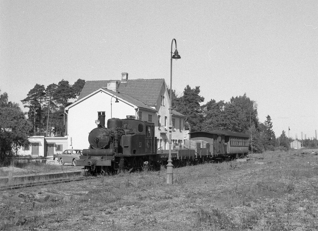 Roma station med det uppställda, kvarlämnade tågsättet 1963.